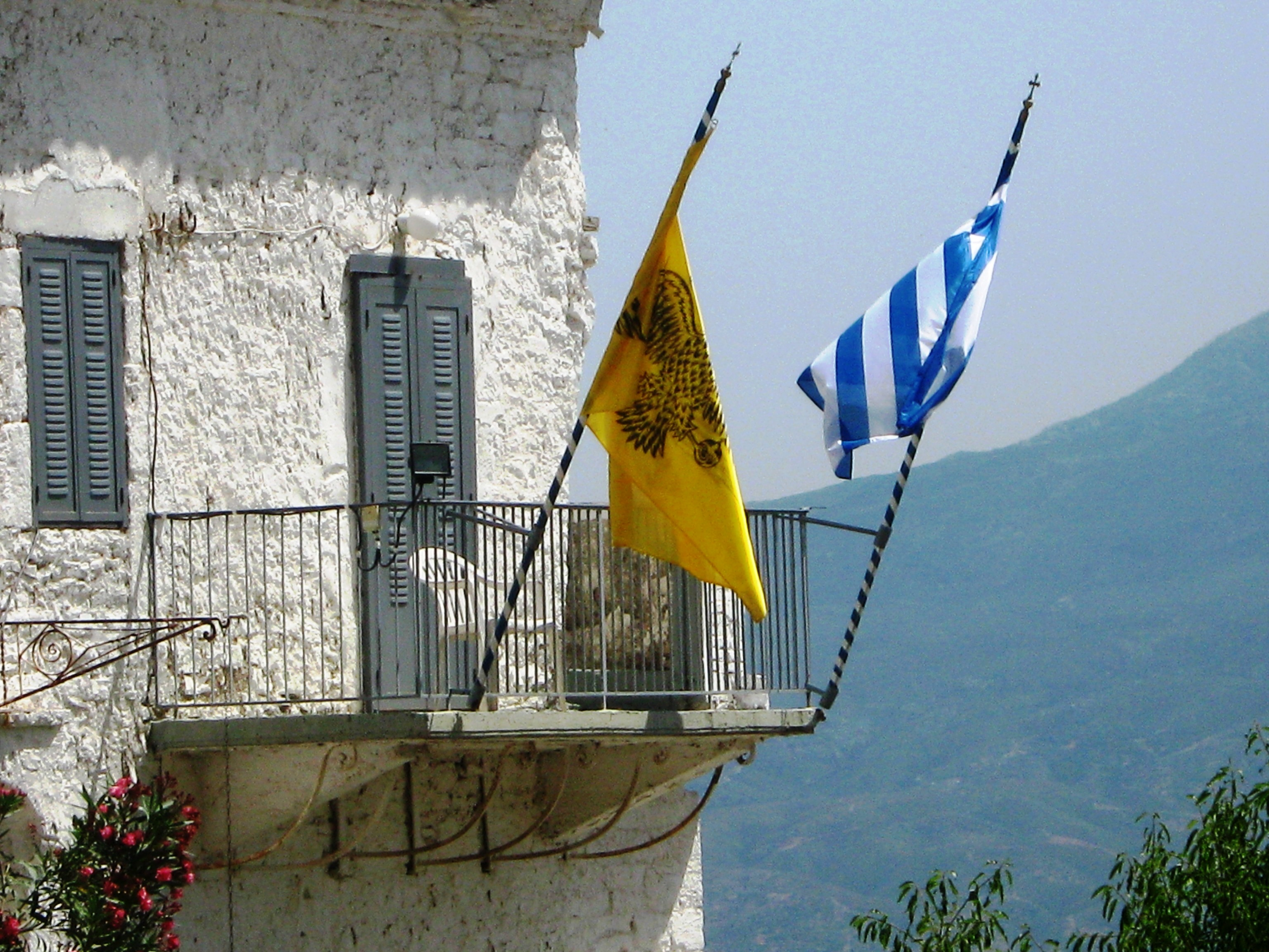 Ιερα μονη Βουλκανου Μεσσηνιας